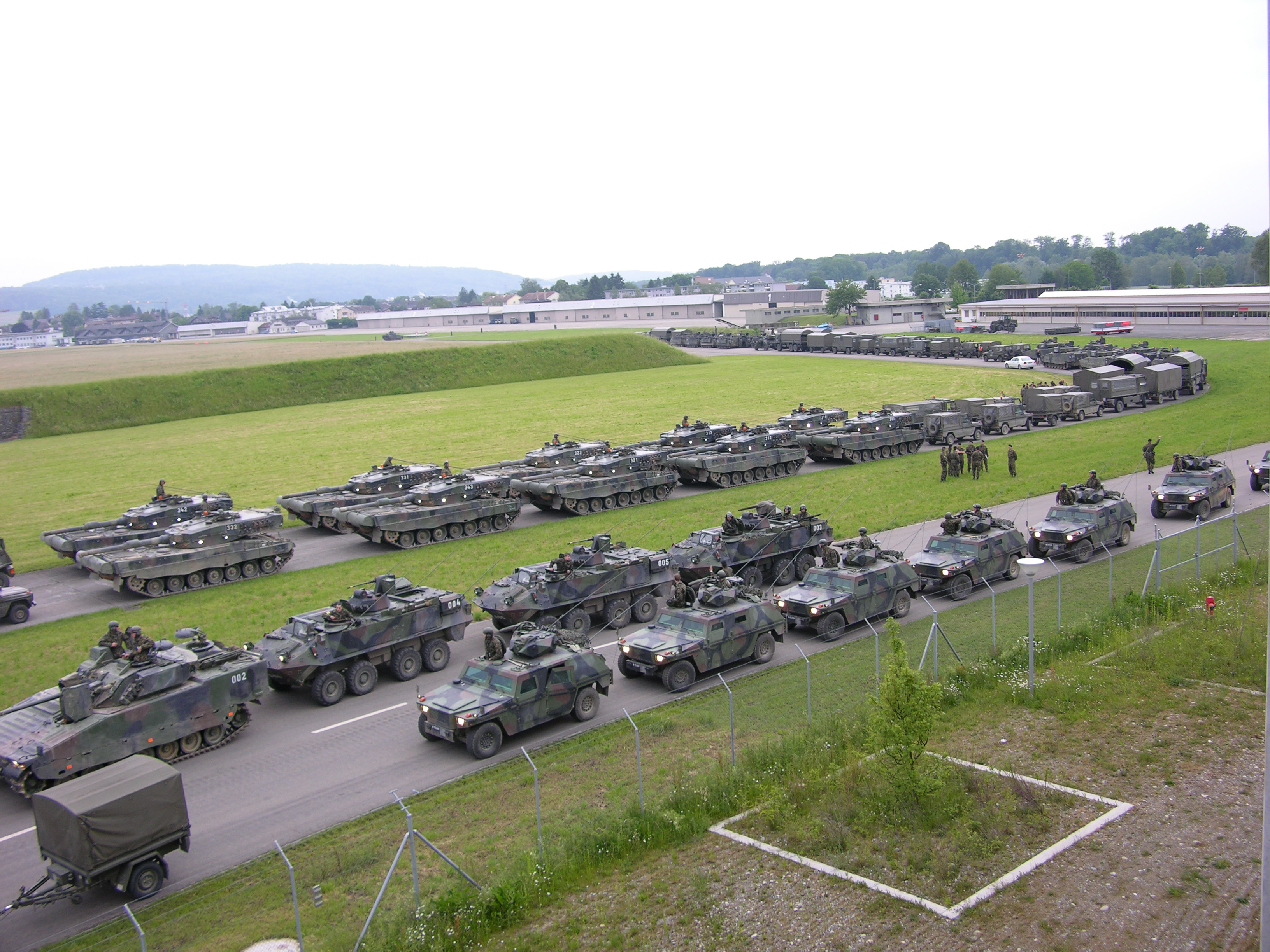 Panzer Bat at Dübi